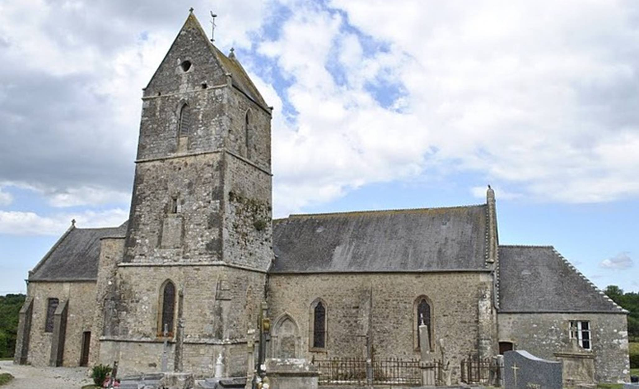 L'Eglise de Saint-Cyr